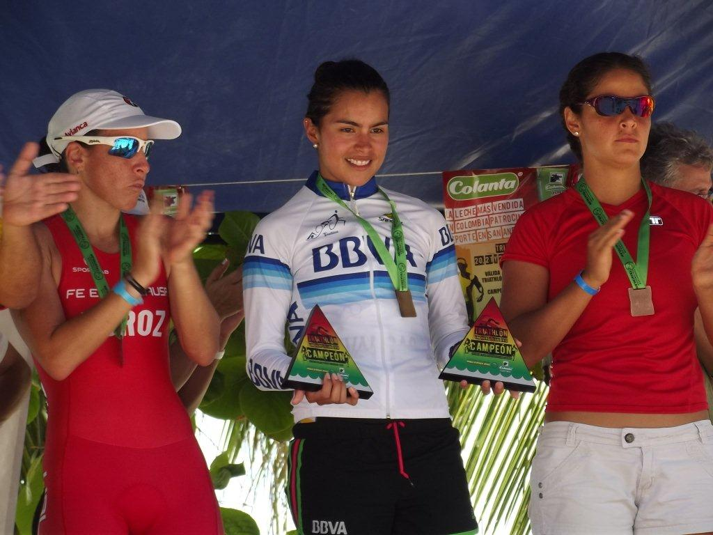 Fiorella D'Croz Brusatin, al lado izquierdo de la Fotografia, con Uniforme Rojo.